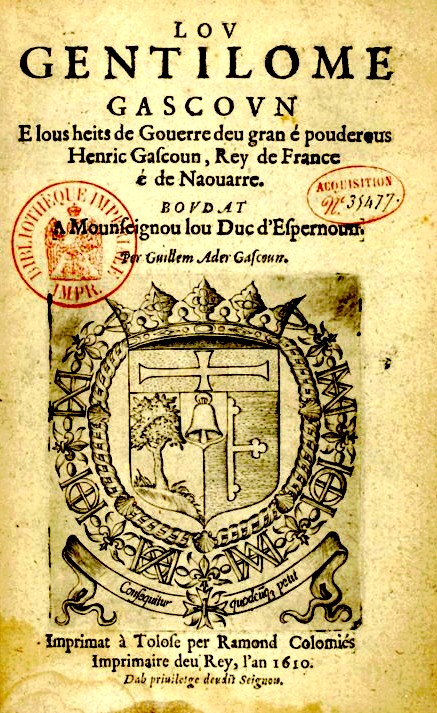 Première page du "Gentilhome gascon" de Guilhem Ader (1610) en gascon.